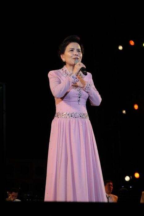 가수 이미자